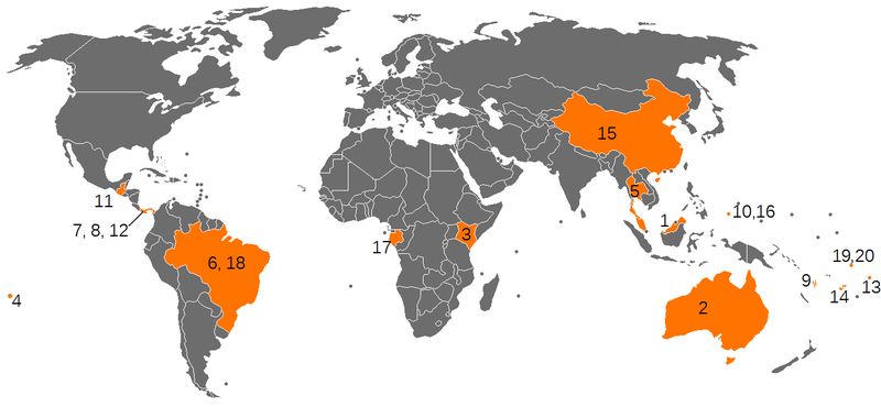 Mapa mundial com as localidades onde foram gravadas as temporadas do reality show Survivor, da rede televisiva americana CBS